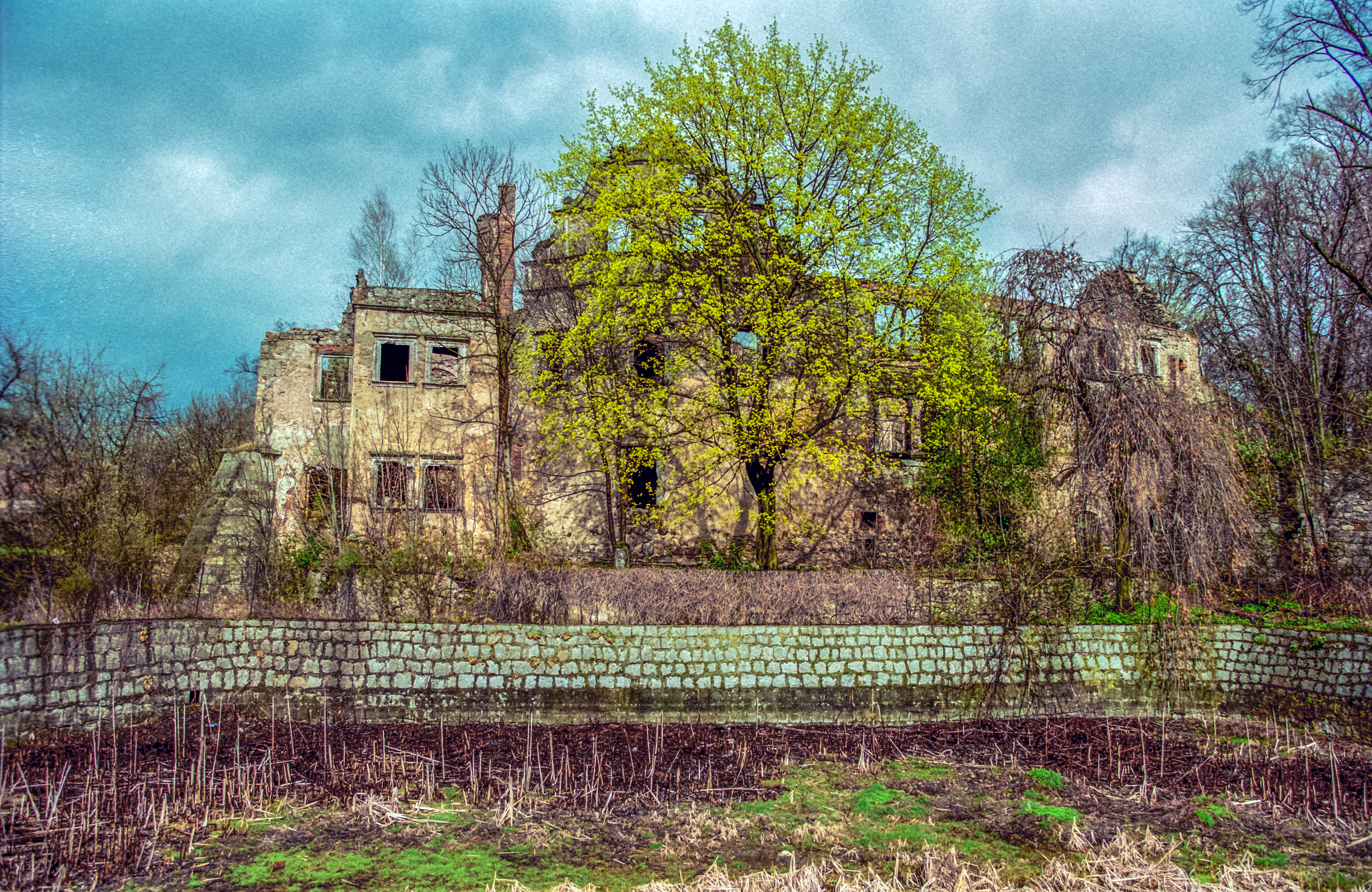 Ruiny pałacu w Gościszowie